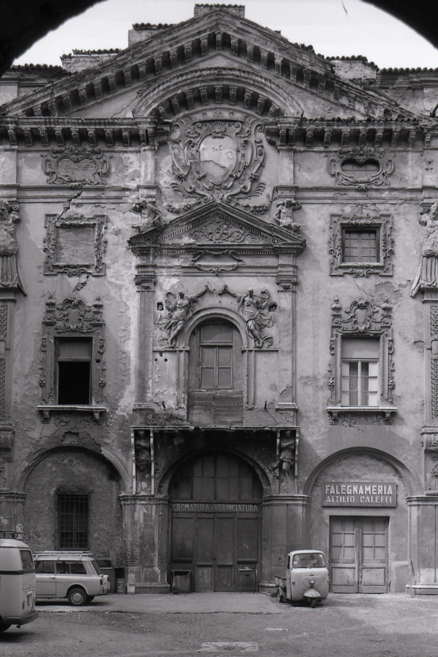 Palazzo Valenti, vista dal cortile interno. Serie fotografica : Mantova, 1972 / Paolo Monti. - Strisce: 7, Fotogrammi complessivi: 38 : Negativo b/n, gelatina bromuro d'argento/ pellicola ; 35 mm. - ((Sul portanegativi: NIKMAT FP4. - Fonte: Agenda di Paolo Monti: Leica 1501-3000 Controllo numerazione (1950-1978), presso Archivio Paolo Monti